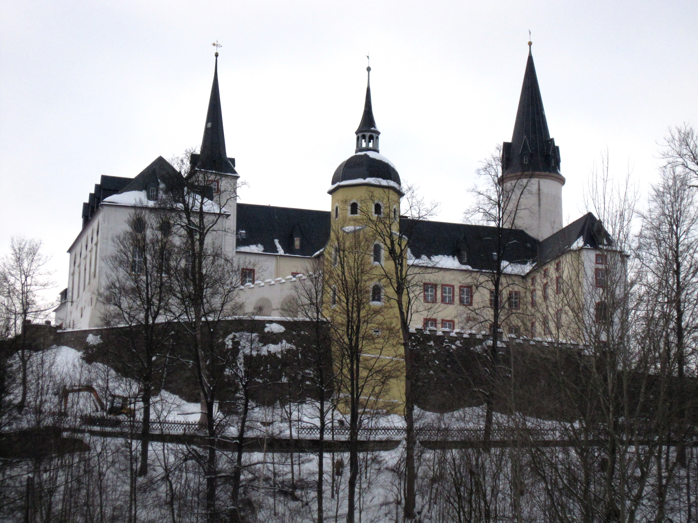 Neuhausen im Erzgebirge Schloss Purschenstein, Februar 2010